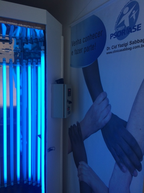 tratamentos duas vezes por semana